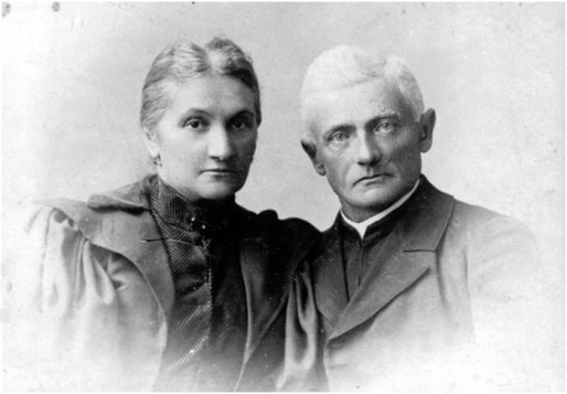 Батьки Соломії Крушельницької – Теодора та о. Амвросій